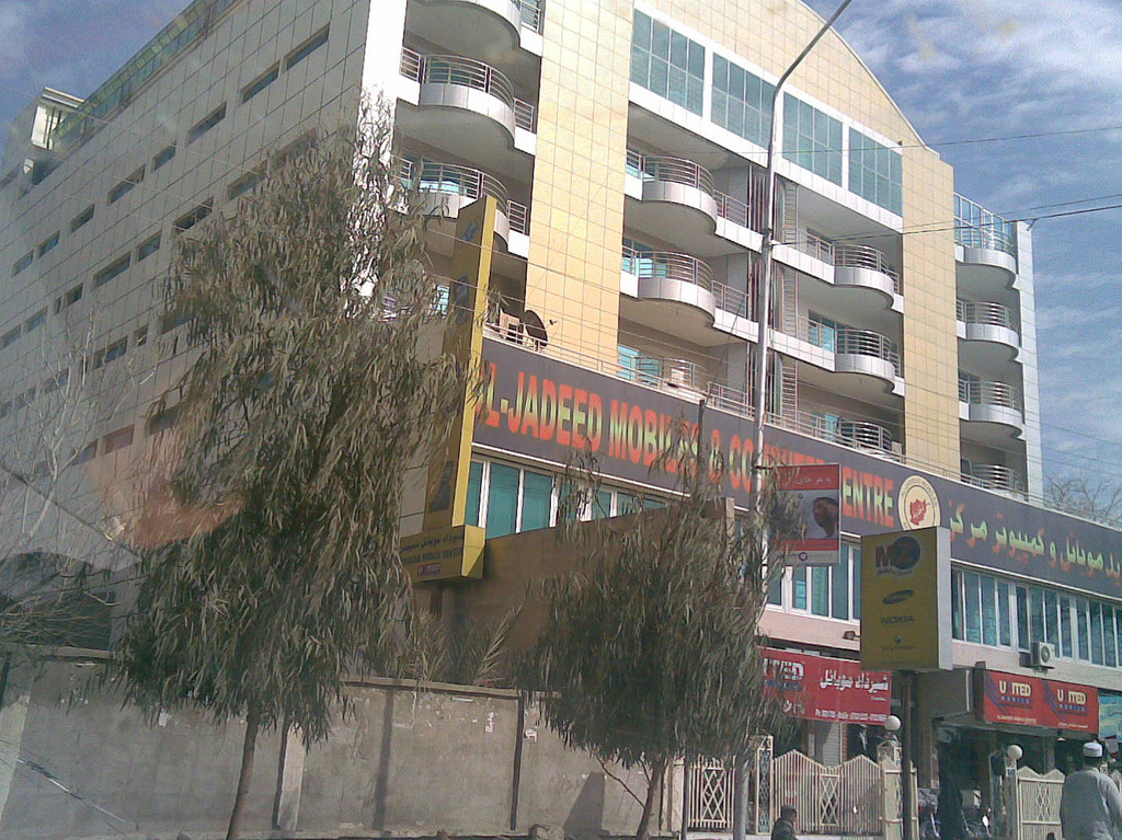 Building in Kandahar City, Afghanistan.